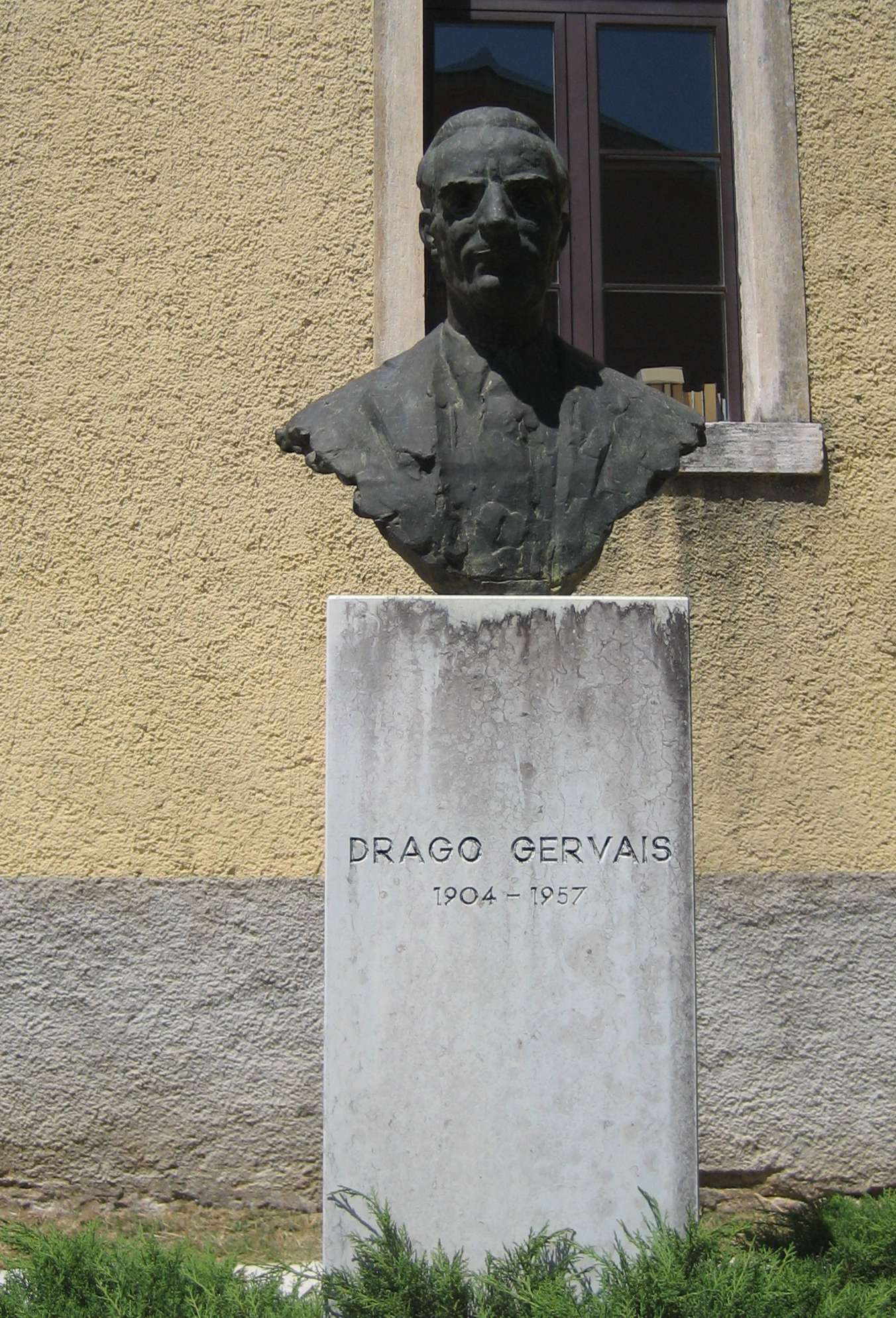 Drago Gervais Denkmal